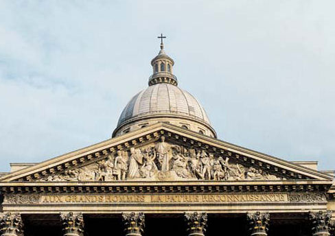 Fronton du Panthéon de Paris par David d'Angers (1831-1837)